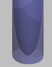 Solide de Sluse construit par rotation d'une cissoide autour de l'axe Oy - Solide de volume fini contenant un volume infini.